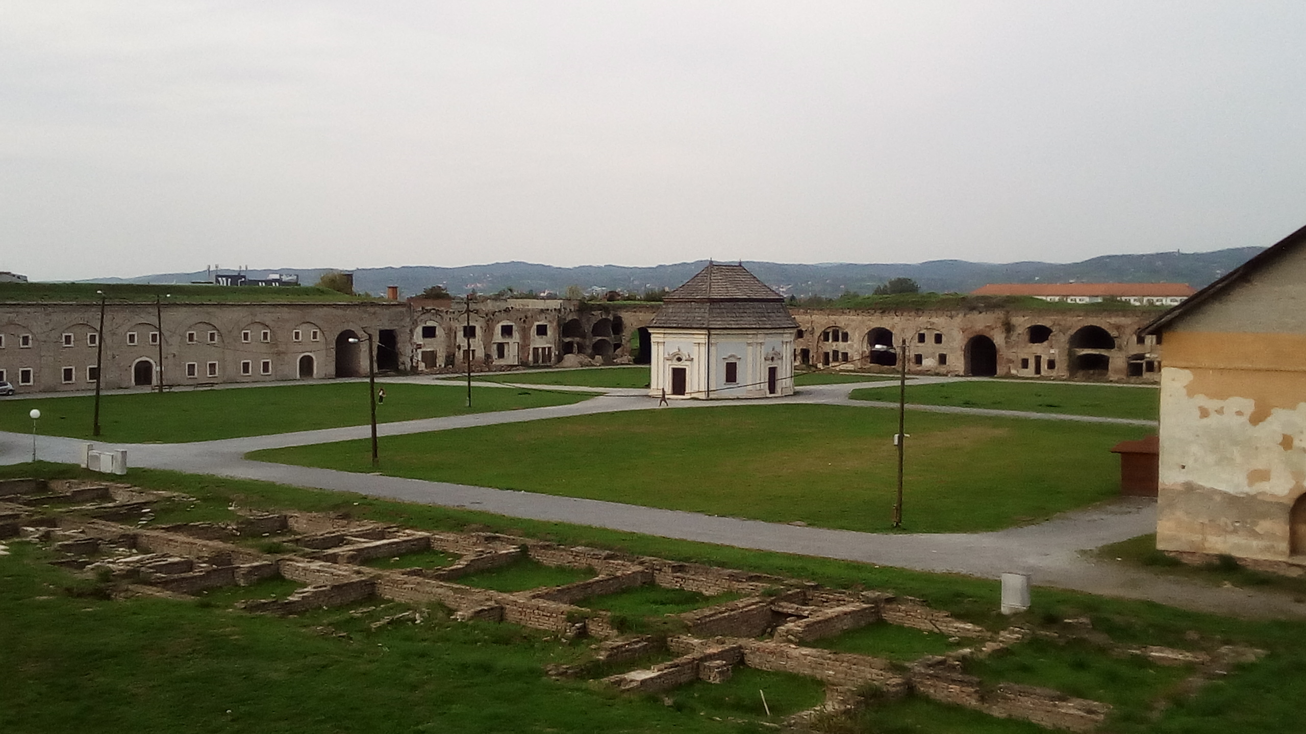 Tvrđava